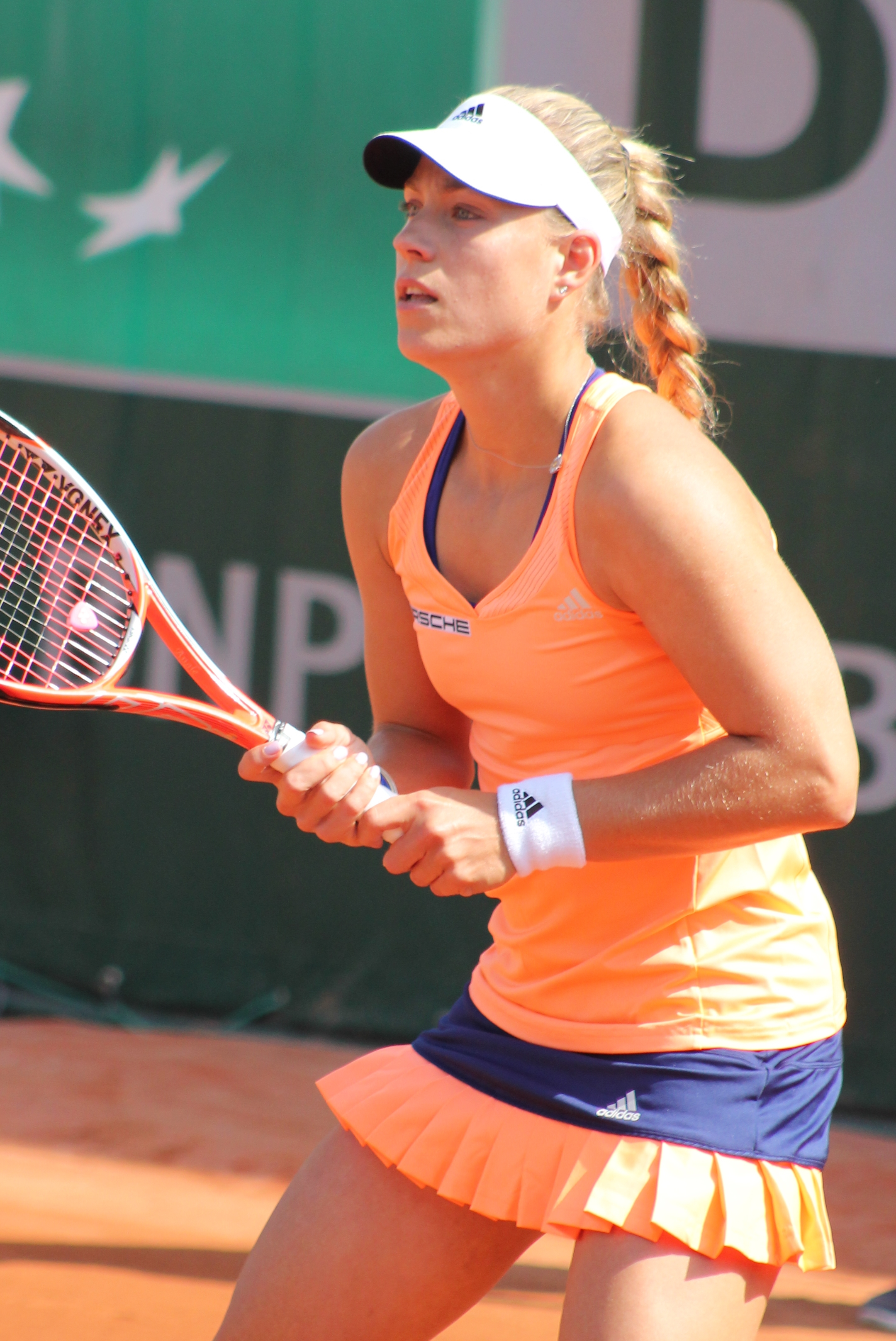 Kerber RG15 (16)